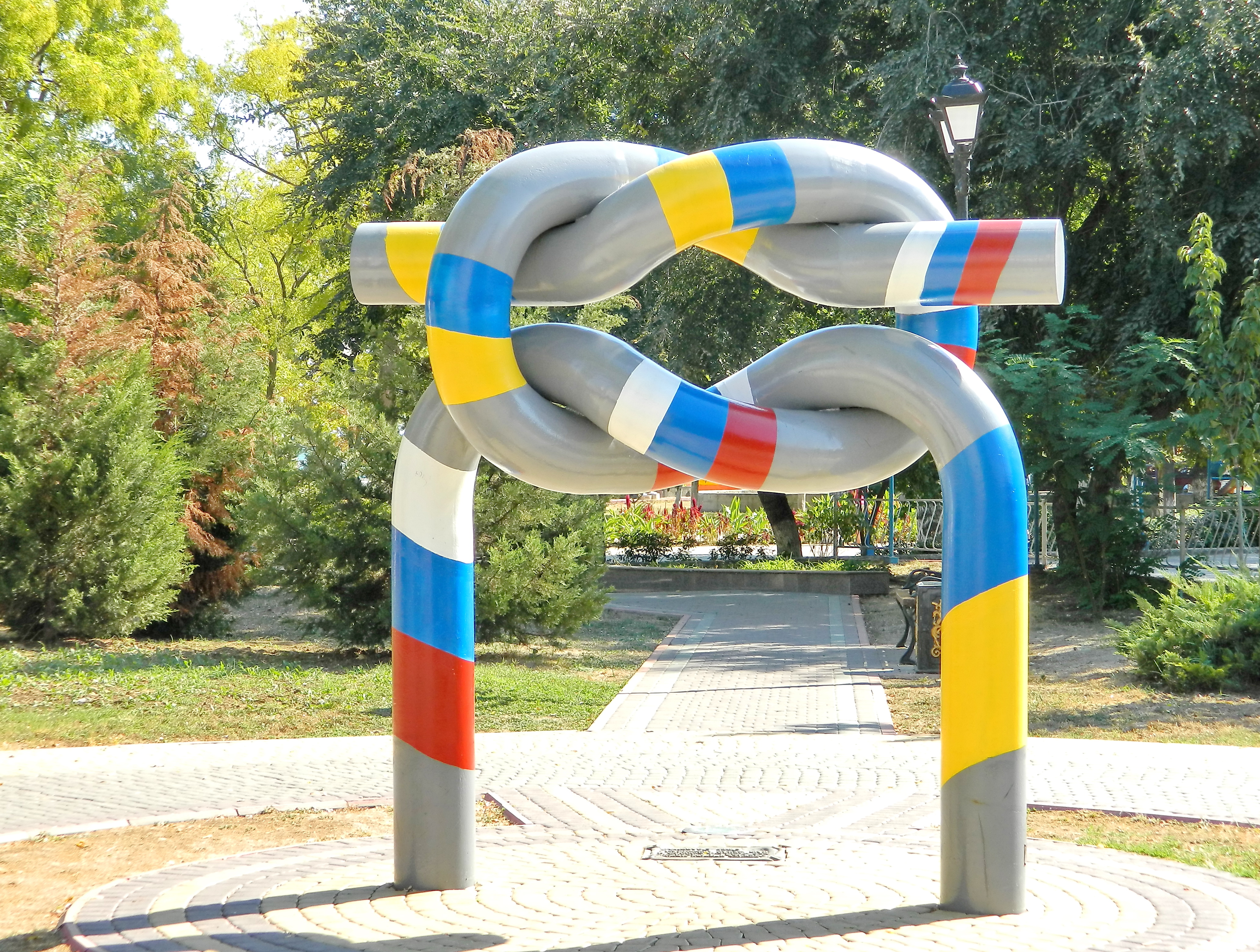 Памятник в Керчи у гостиницы Море.